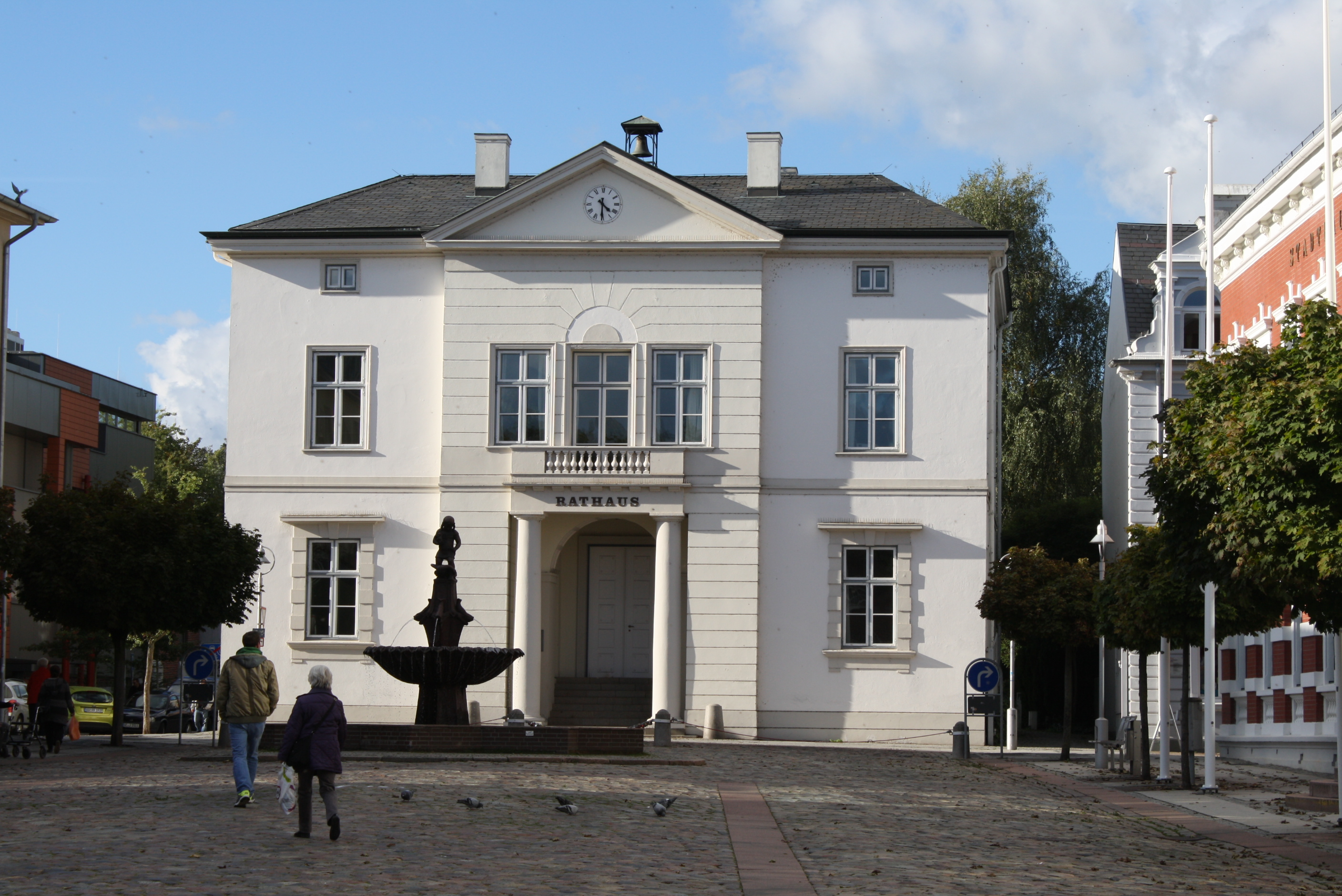 Rathaus